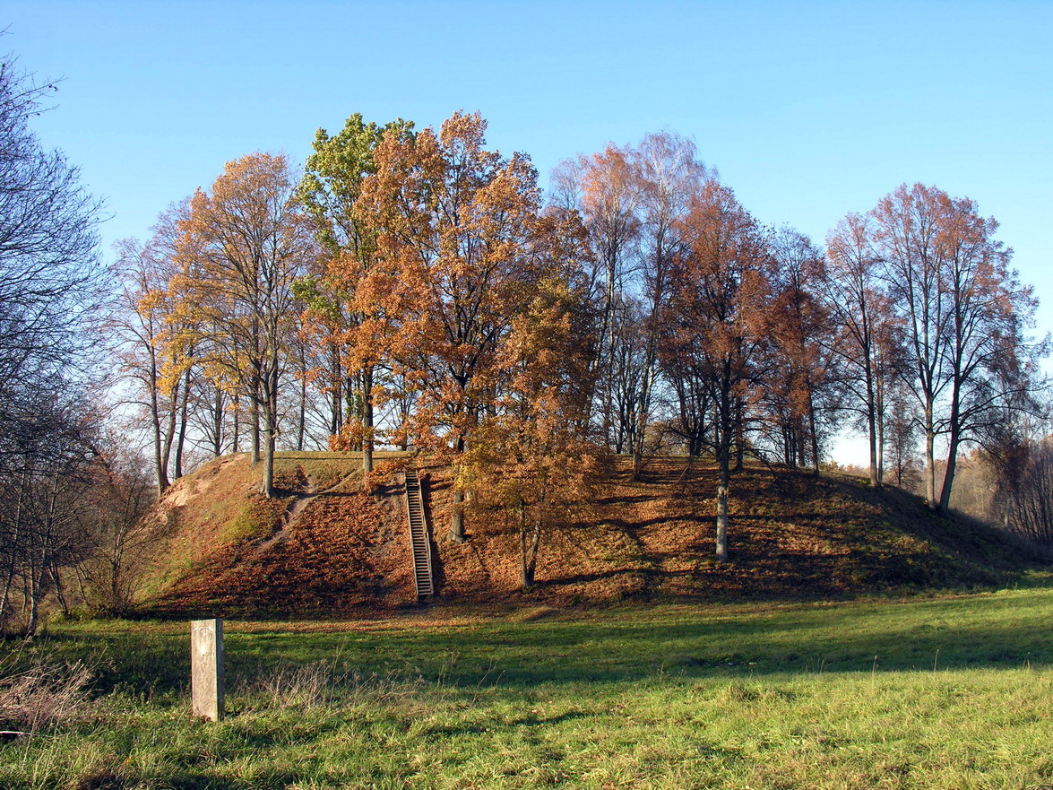 Žemaitėška: Daubariu pėlekalnis Mažėikiu rajuonė Puortegrapėjė Algėrda, 2005 m. spalė 31 d.